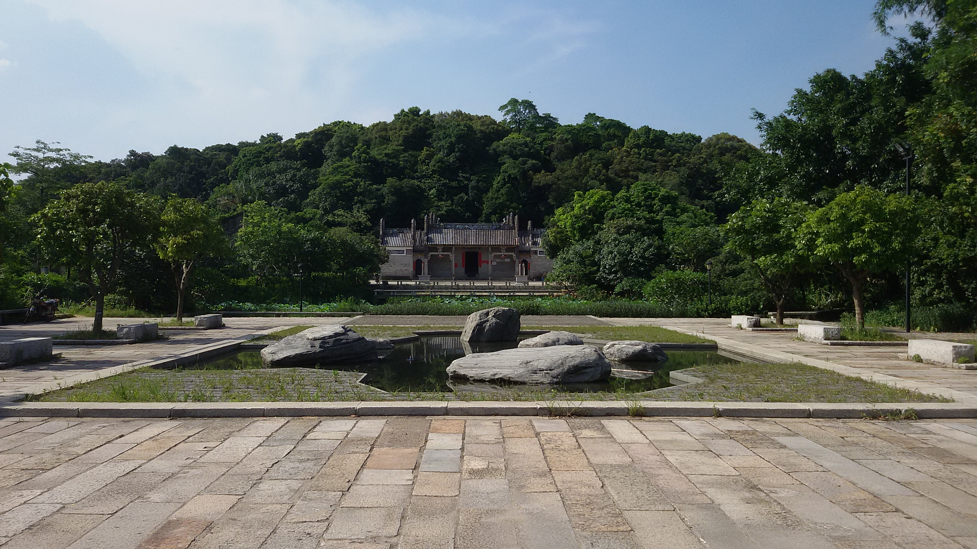 粵語: 蓮塘村西邊嘅大廣場